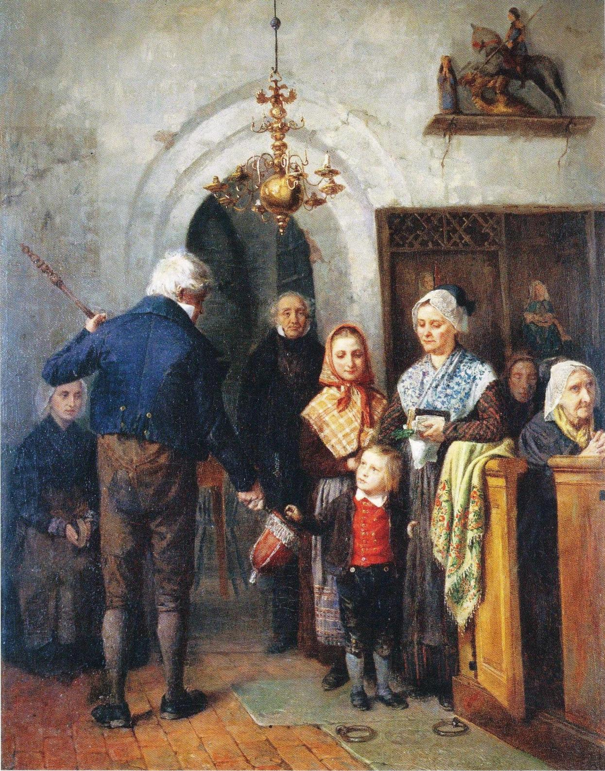 K. E. Janssonin maalaus Ropo haaviin. Sijaitsee nykyään J. L. Runebergin kotimuseossa Porvoossa.